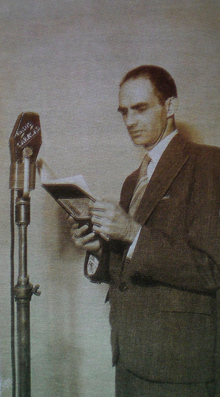 Venezuelan composer Juan Bautista Plaza